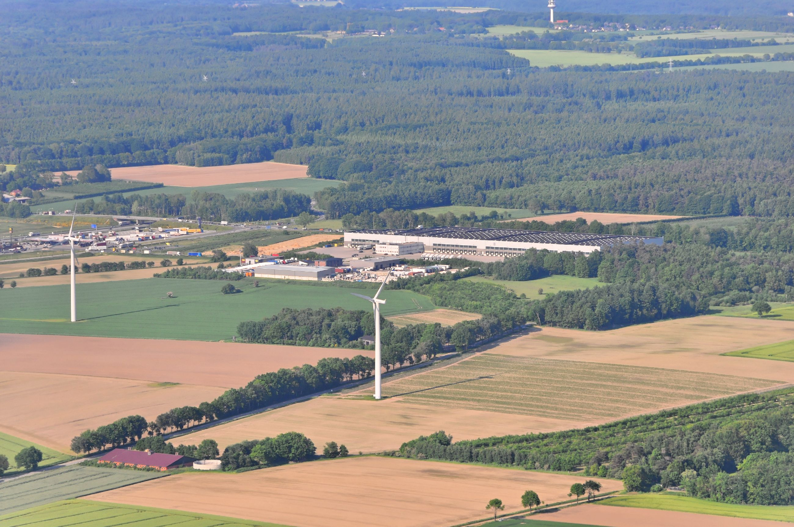 Überführungsflug vom Flugplatz Nordholz-Spieka über Lüneburg, Potsdam zum Flugplatz Schwarzheide-Schipkau